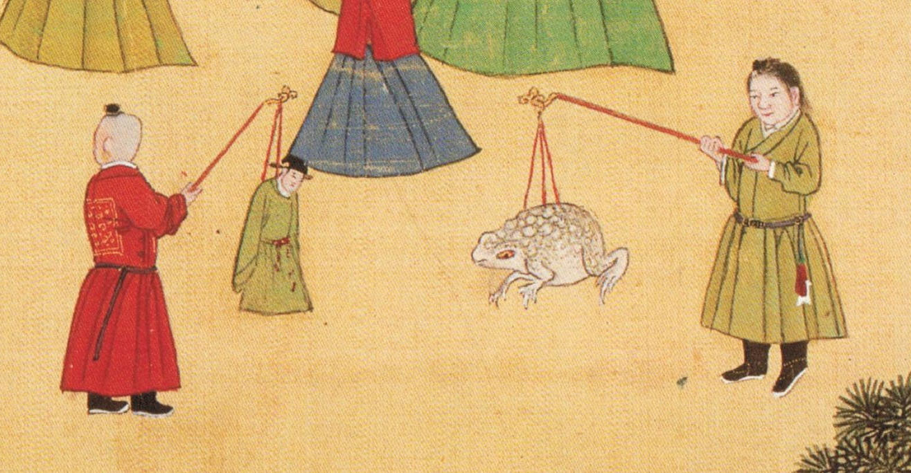 中文（香港）: 明憲宗行樂圖